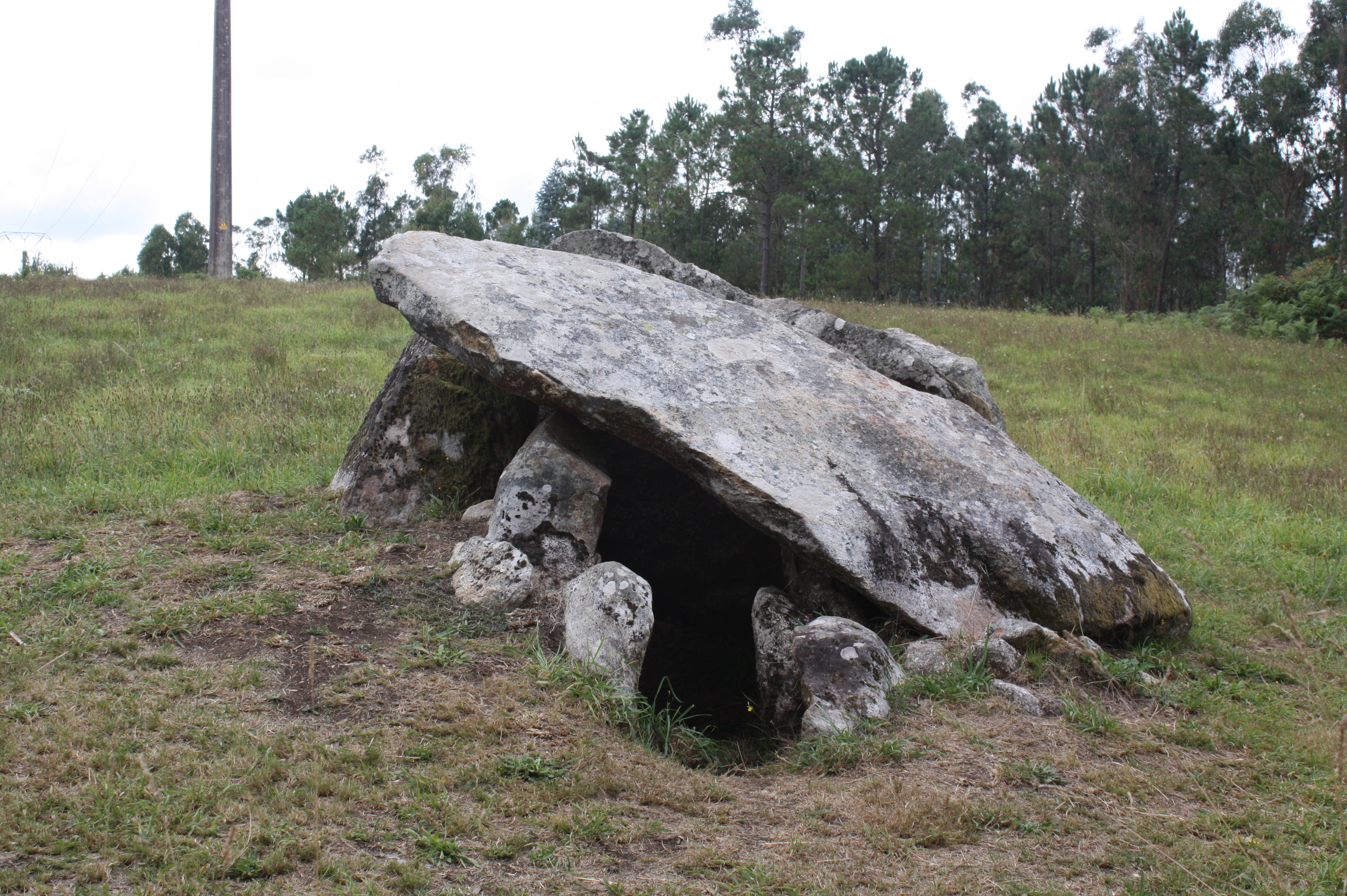 Dolmen de Pedra Moura, en Treos, parroquia de Vimianzo (A Coruña)